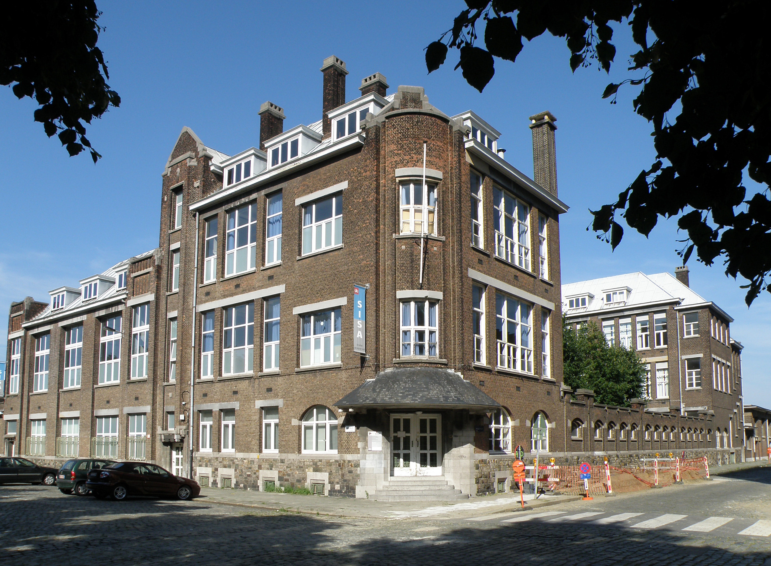 Antwerpen, België. Stedelijk Instituut voor Sierkunsten en Ambachten (afgekort SISA) aan de Napelsstraat, in de buurt Eilandje. Ontwerp van architect Emiel Van Averbeke, anno 1919-1925.